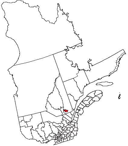 サグネ.